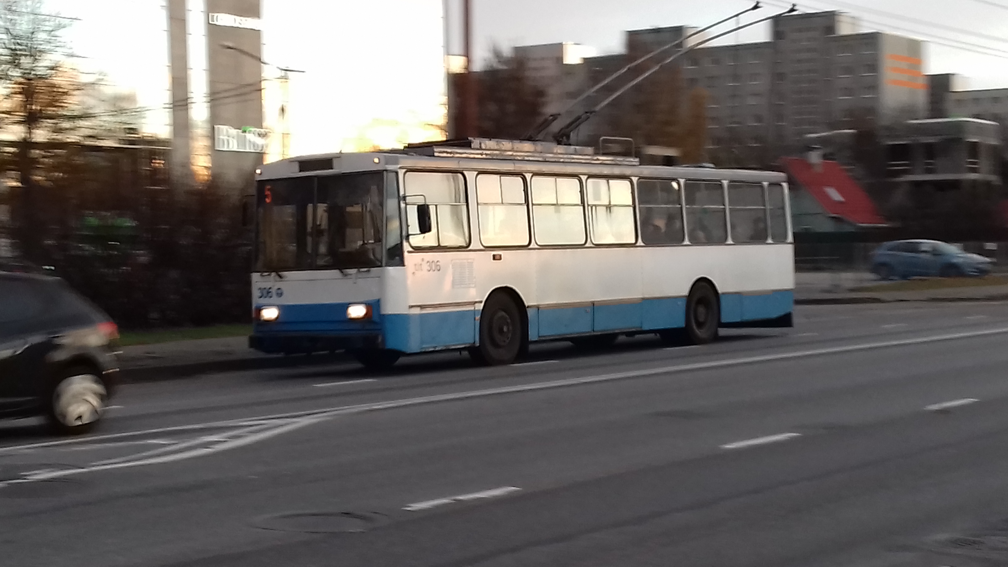 Škoda 14TR 5 Trolliliinil Mustamäe teel